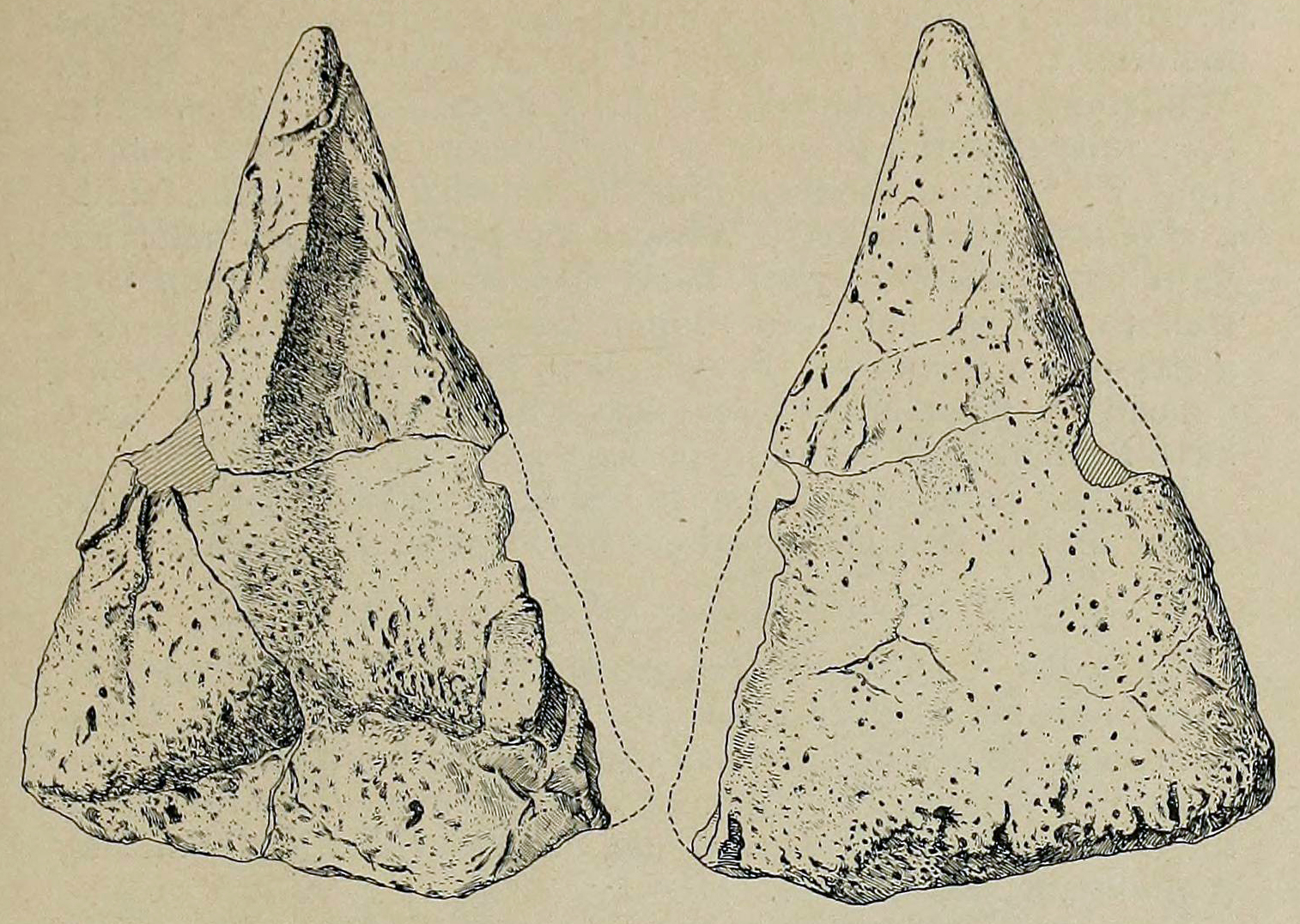 Hierosaurus spine.